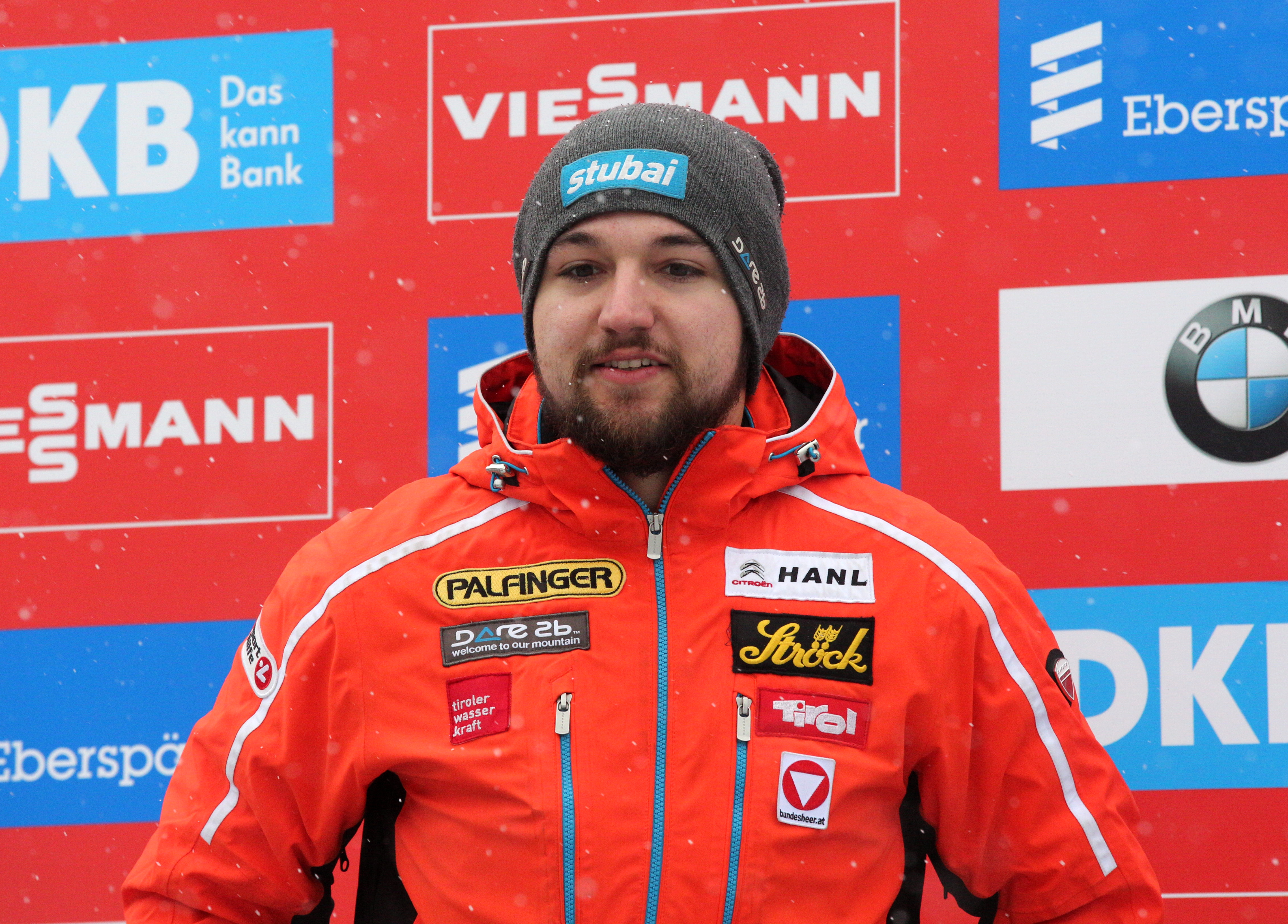 David Gleirscher bei der Siegerehrung zur Gesamtwertung des Rennrodel-Nationencup der Herren